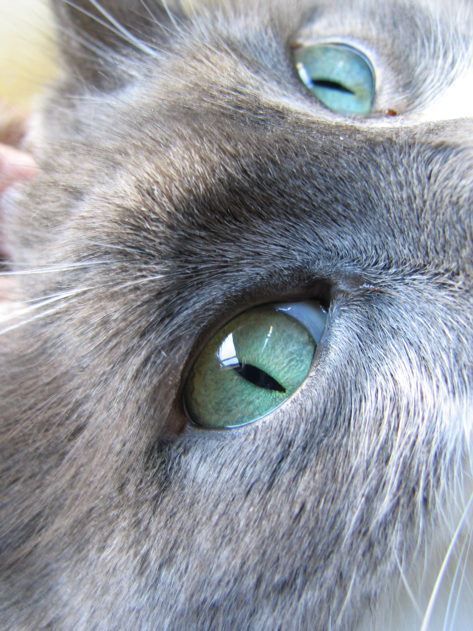 Cat's Eyes